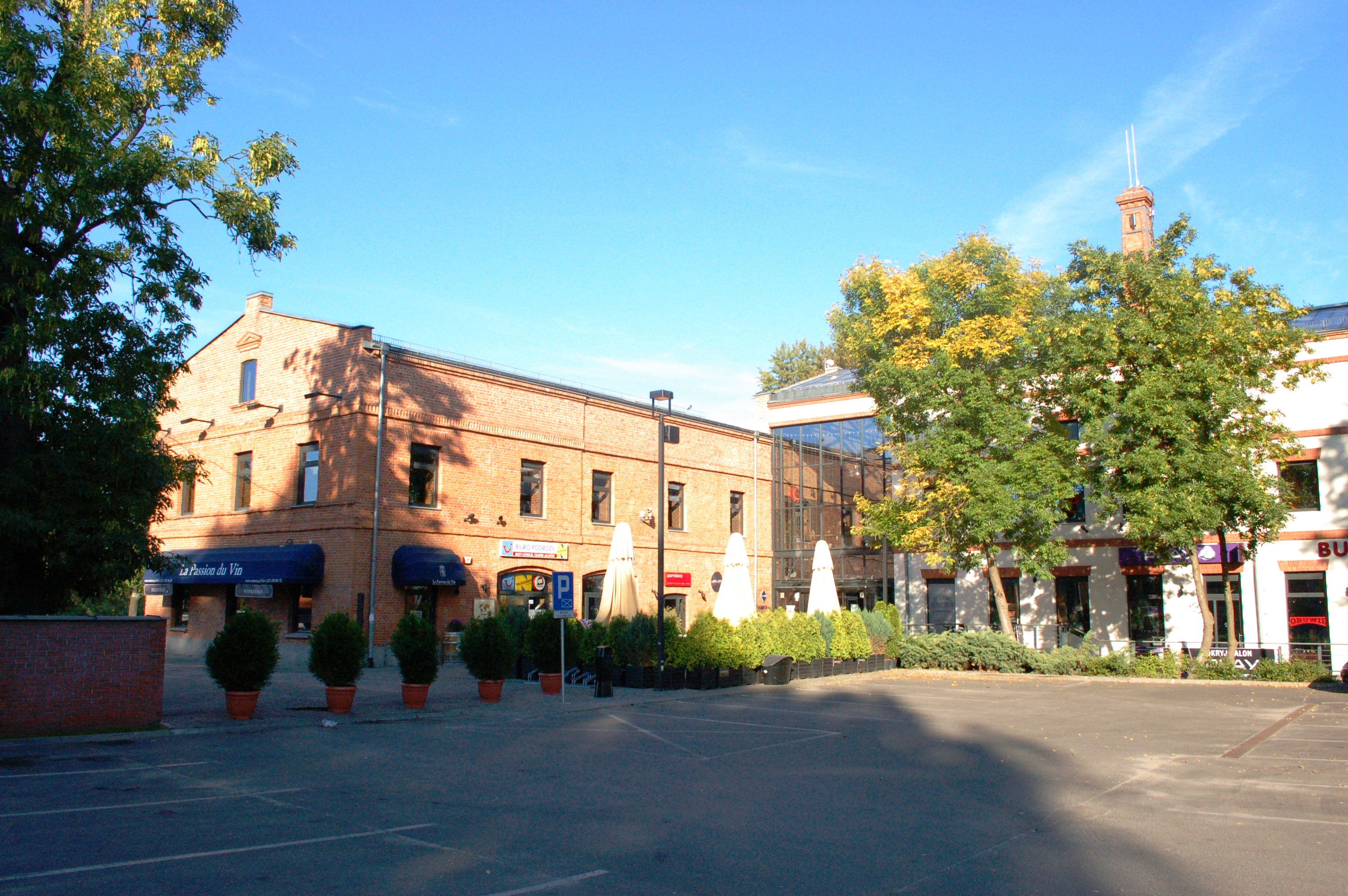 Stara Papiernia, Konstancin-Jeziorna, Shopping centre